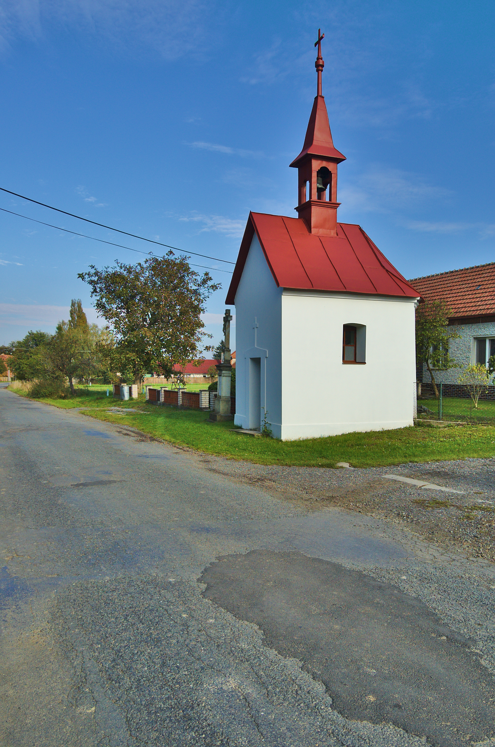 Kaple, Nová Dědina, Konice, okres Prostějov